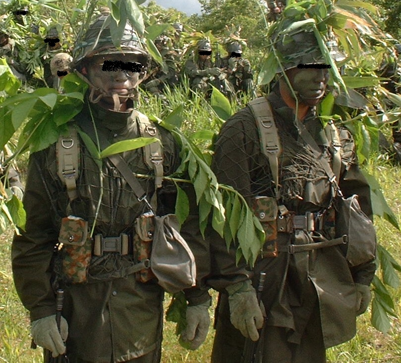 偽装網を装着した隊員の姿、OD作業服にOD雨衣を着用しその上にさらに偽装網を装着し擬装用の草などを付けている（90年代撮影）